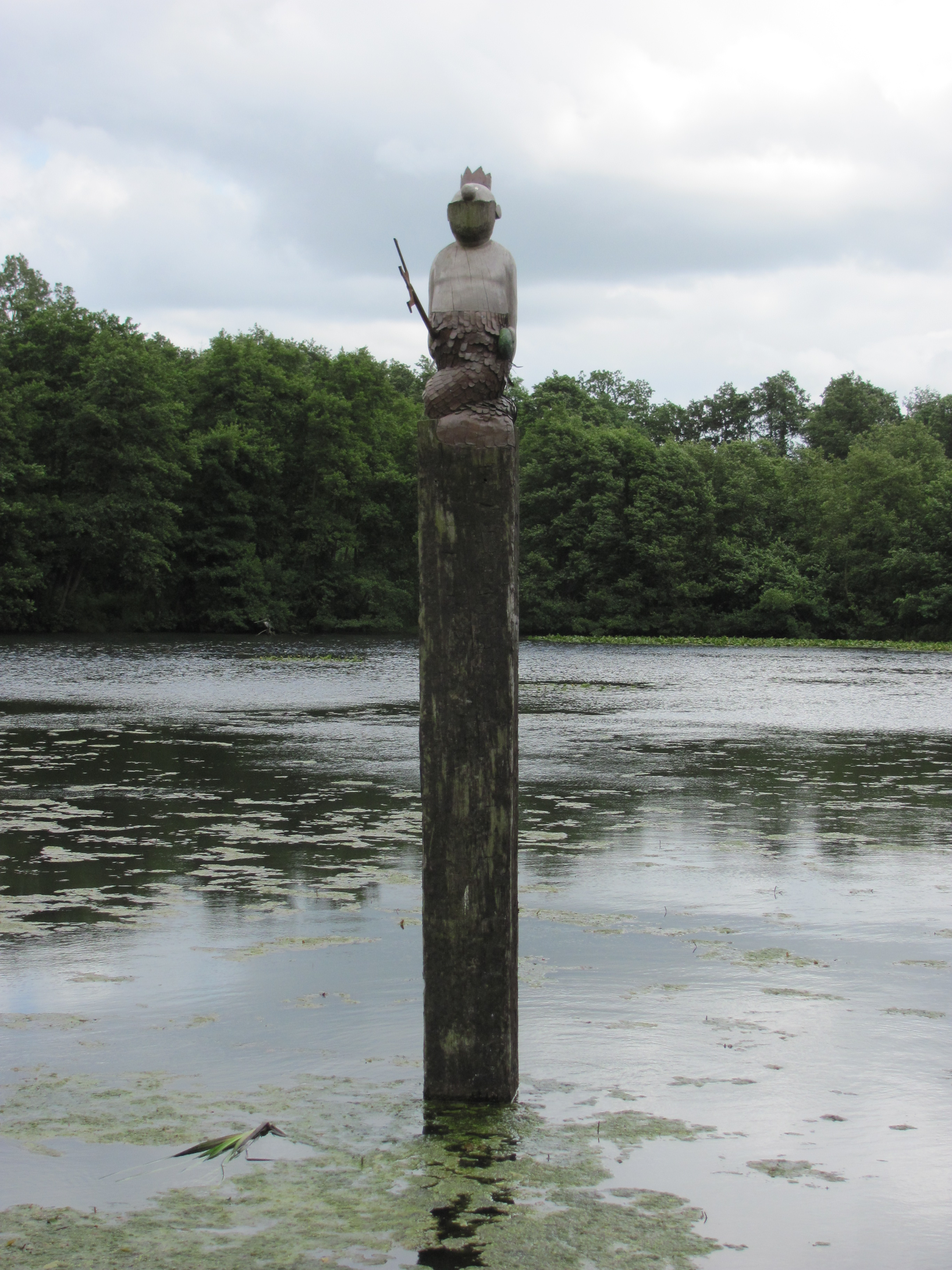 Am Deinster Mühlenteich